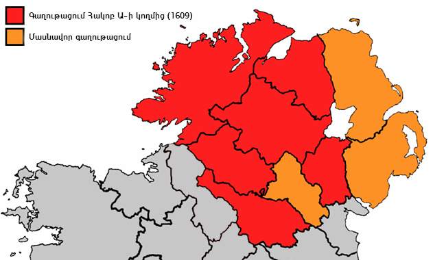 Օլսթերի գաղութացում